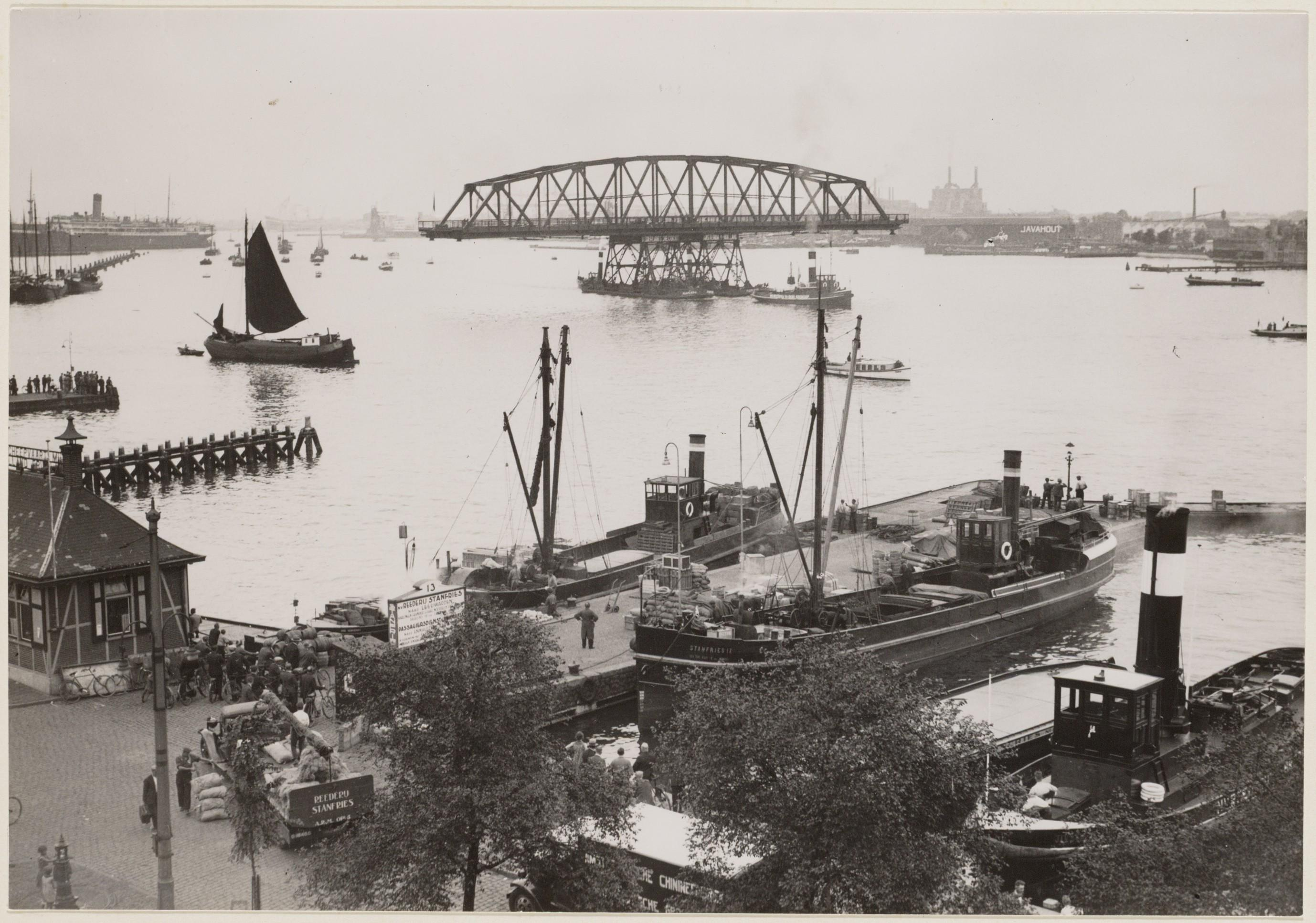 Beeld gemaakt vanaf de Ruijterkade. Geschoten in noordelijke richting bij de Westertoegang naar het toentertijd afgesloten IJ. Op de voorgrond liggen enkele beurtvaartschepen aan de steiger. Op het IJ wordt een brugdeel van de Muiderbrug naar het Merwedekanaal gesleept.